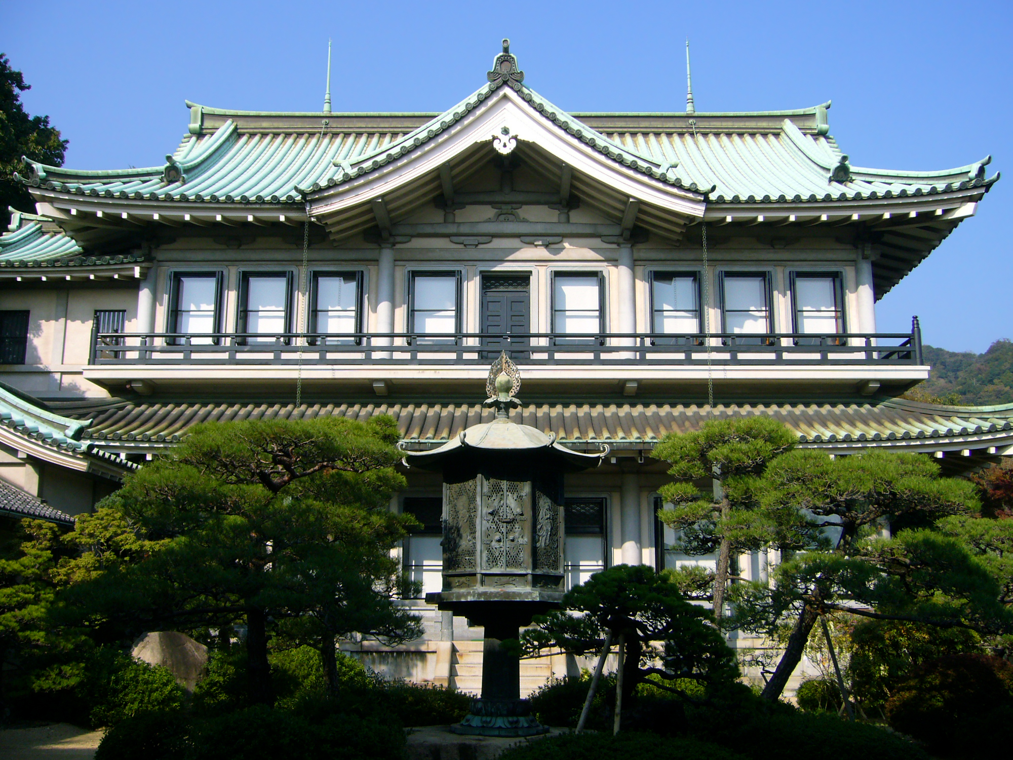 白鶴美術館 本館（兵庫県神戸市東灘区住吉山手） 撮影者-663highland，撮影日-2005年11月5日 Category:東灘区の画像 Category:博物館の画像